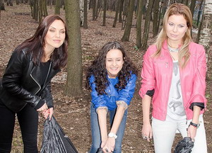 Группа «Блестящие» на субботнике в 2013 году. Слева направо: Надежда Ручка, Марина Бережная, Анастасия Осипова